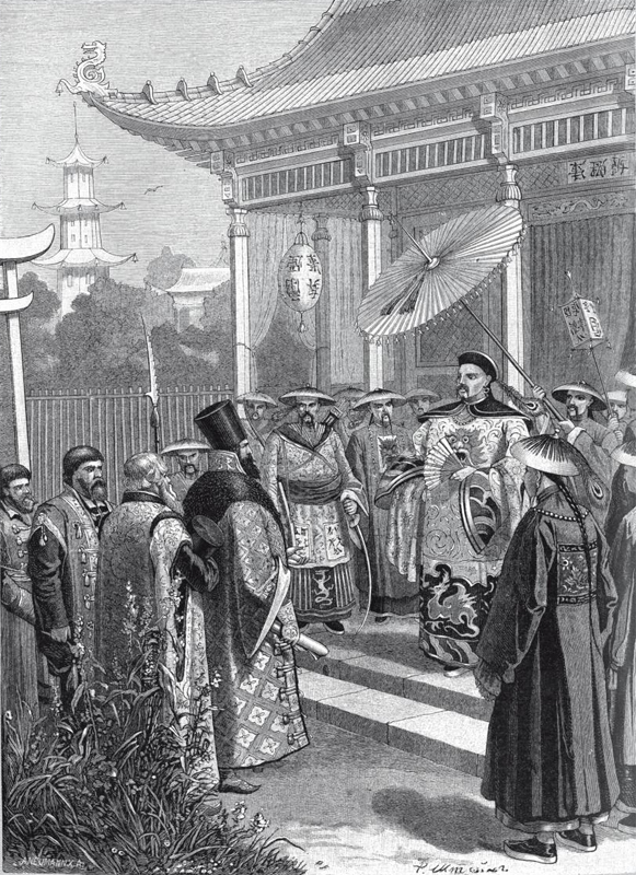 Русские послы XVII в. в Китае (журнал Нива)